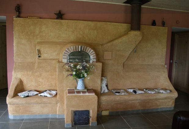 poêle de masse flexoven avec son enduit de chaux